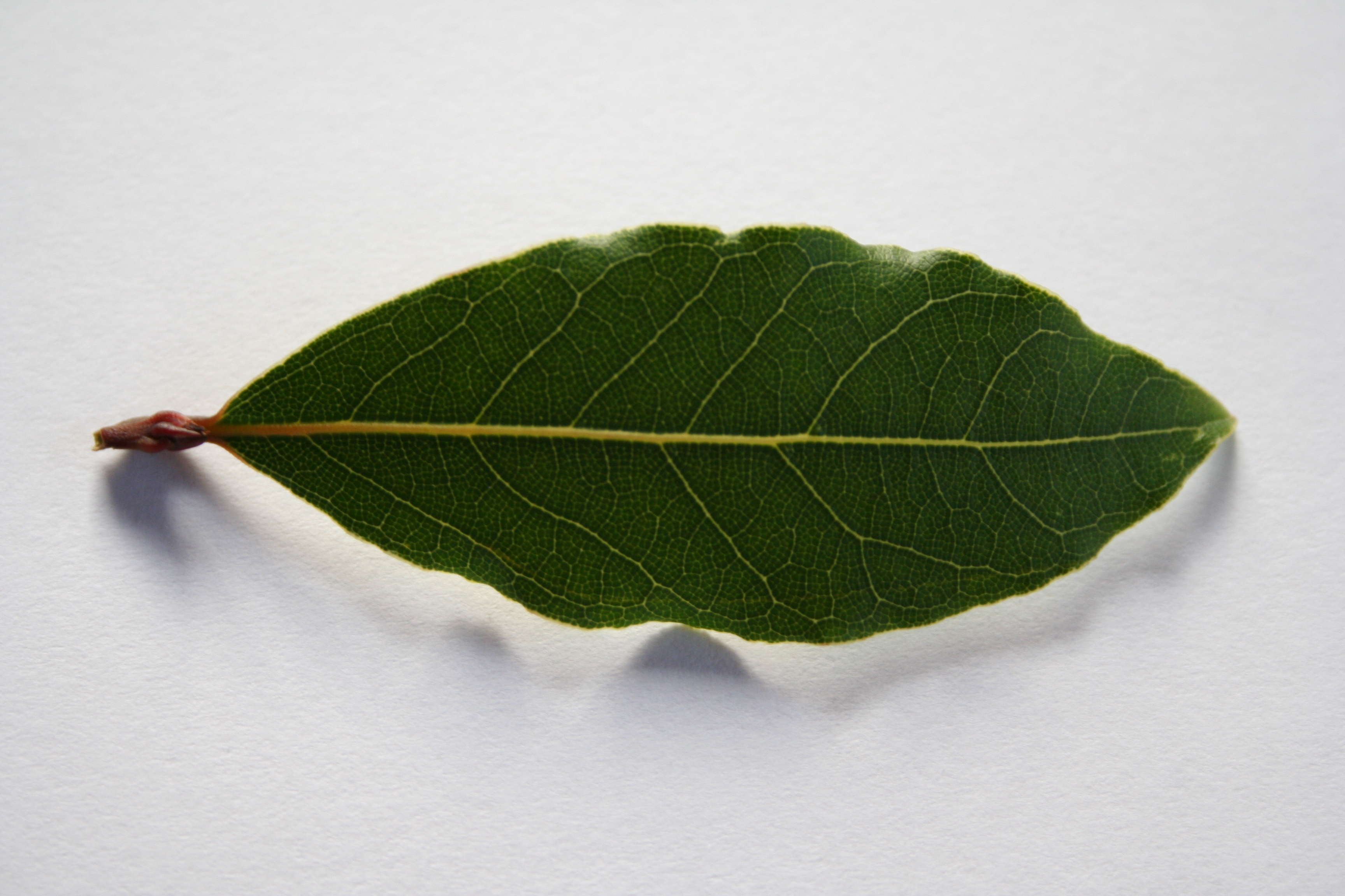 Lorbeer